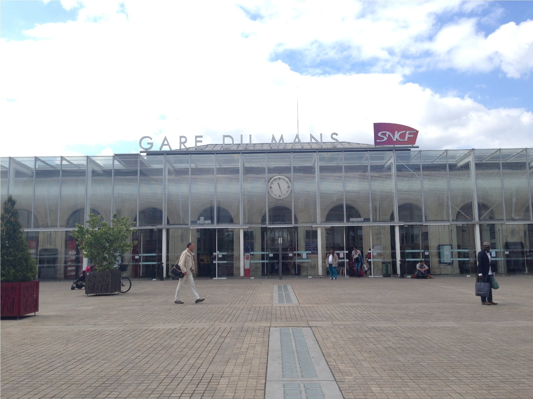 勒芒站（Gare du Mans）